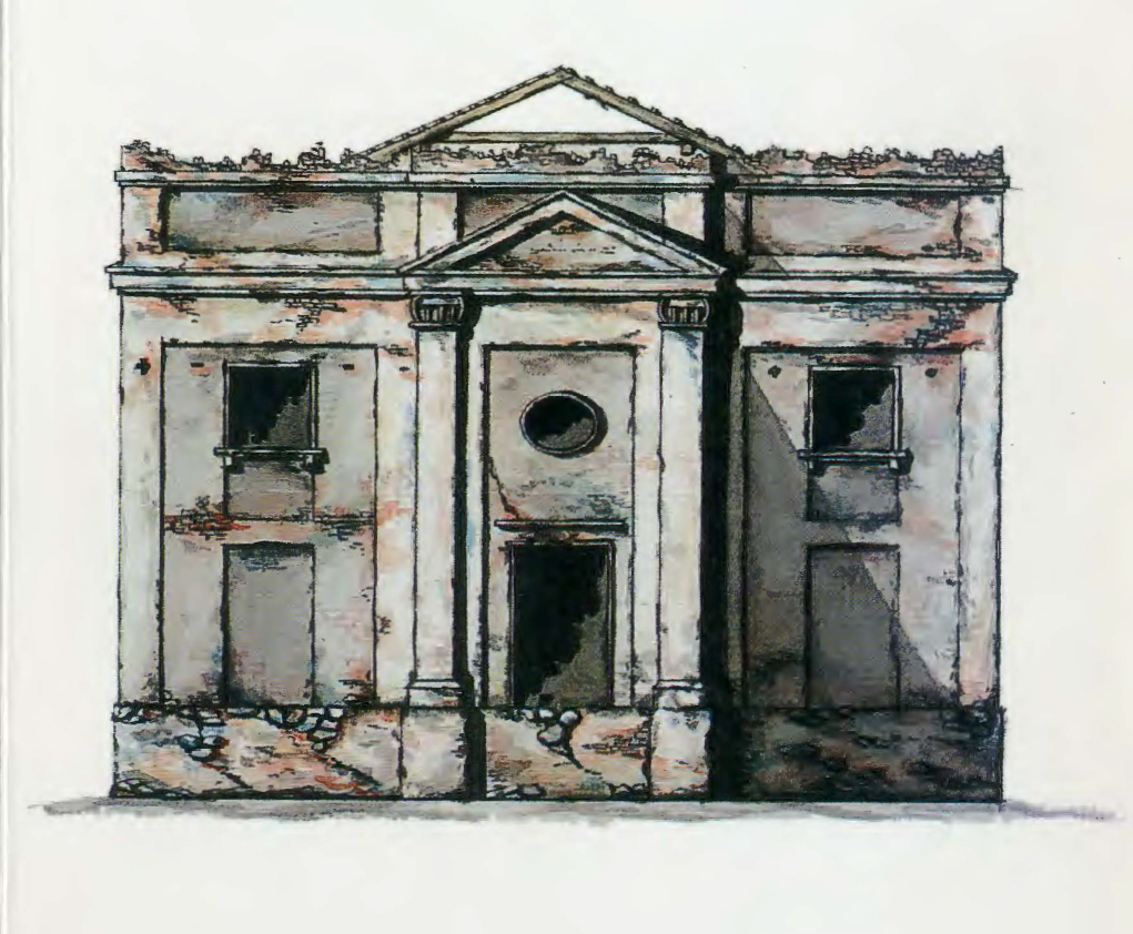 Беларуская (тарашкевіца): Дуброва Гарадзенская (Dubrova Haradzienskaja). Царква пад неідэнтыфікаваным тытулам